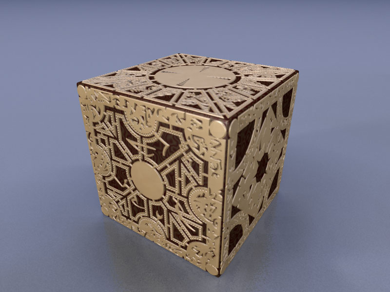 3D модель Шкатулки Лемаршана